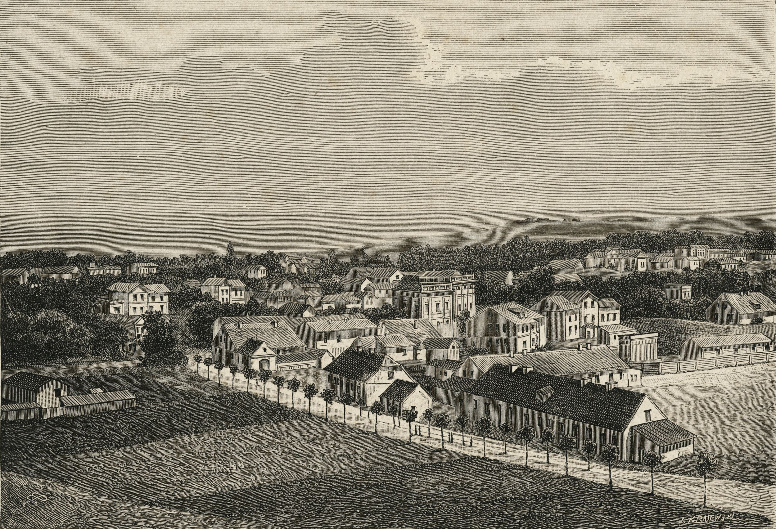 Widok ogólny Sopotu